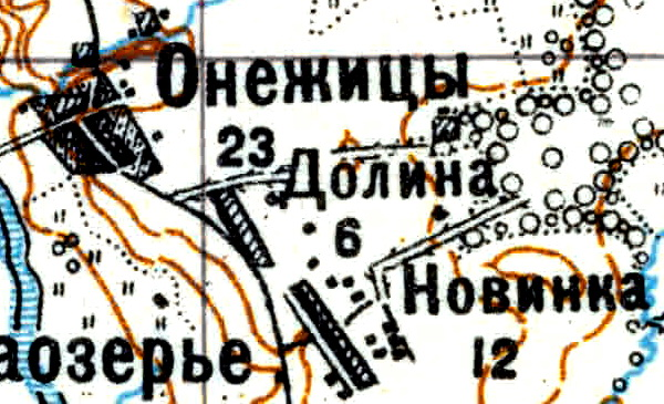 Топографическая карта Ленинградской области, квадрат Vc-29 (Батецкая), деревня Онежицы